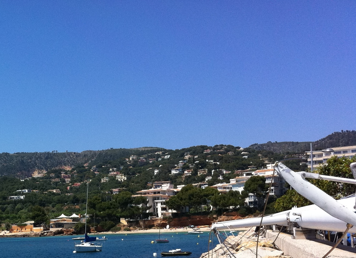 Costa d'en Blanes (Calvià - Mallorca)